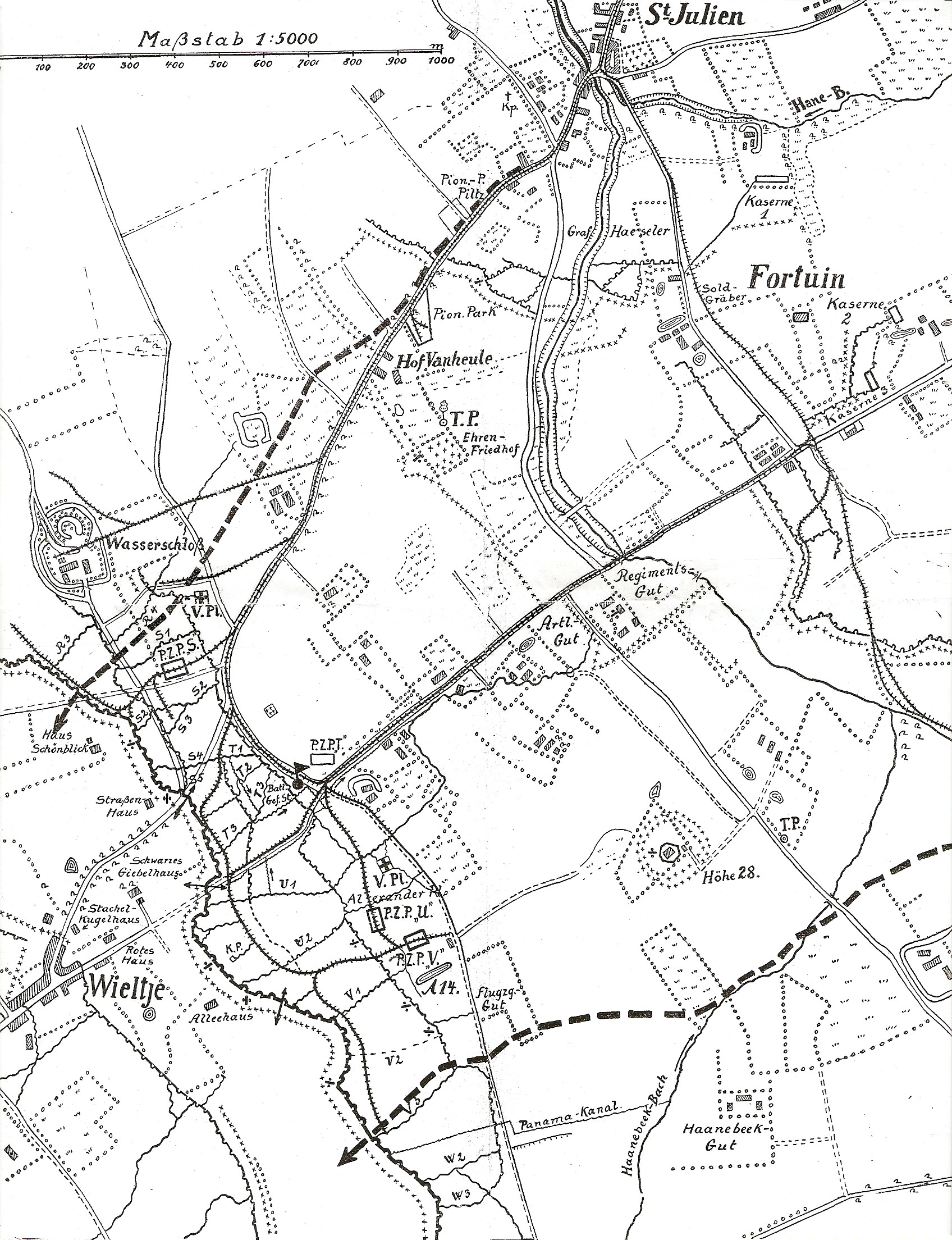 Stellung bei St. Julien in Flandern